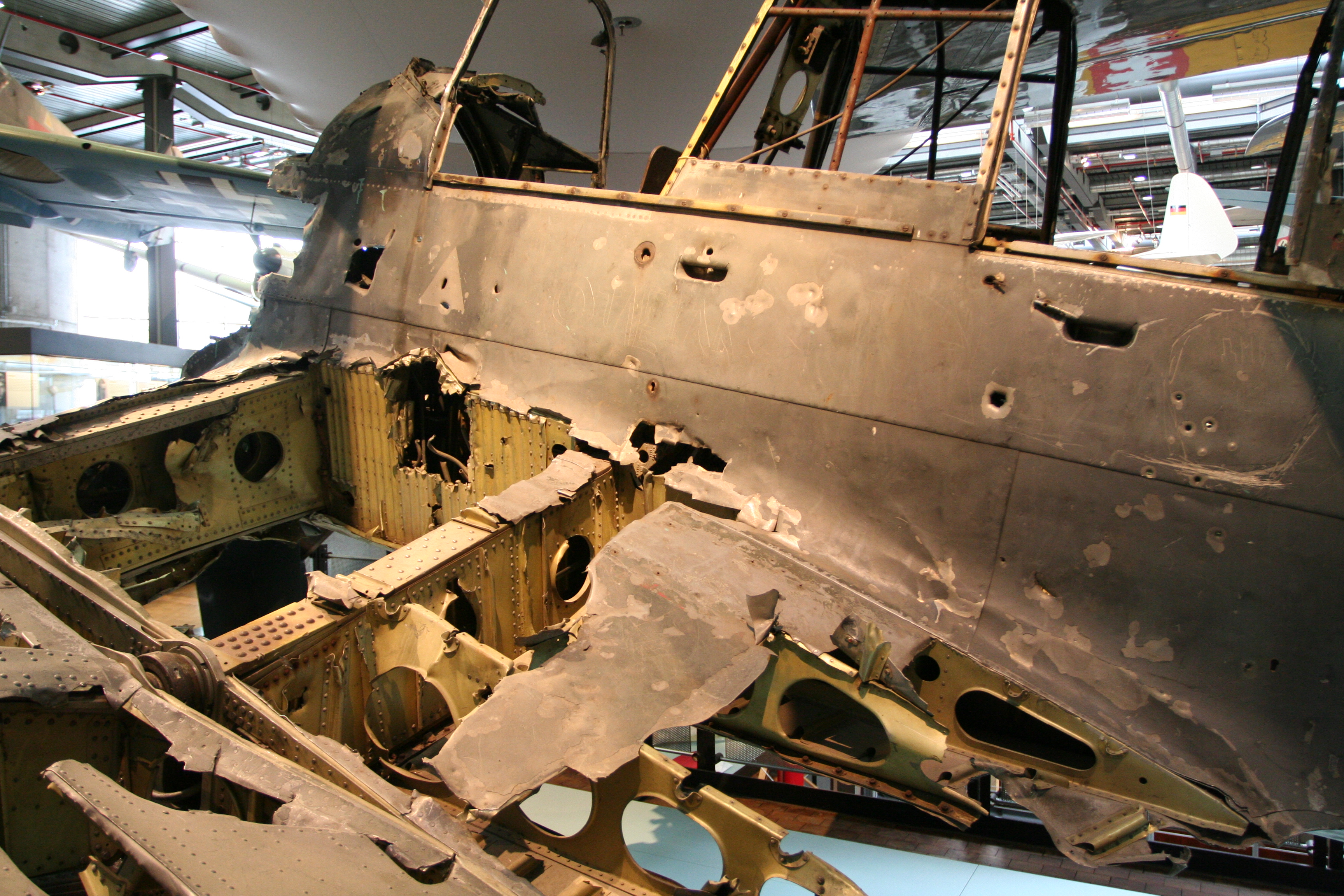 Ju-87_Wrack